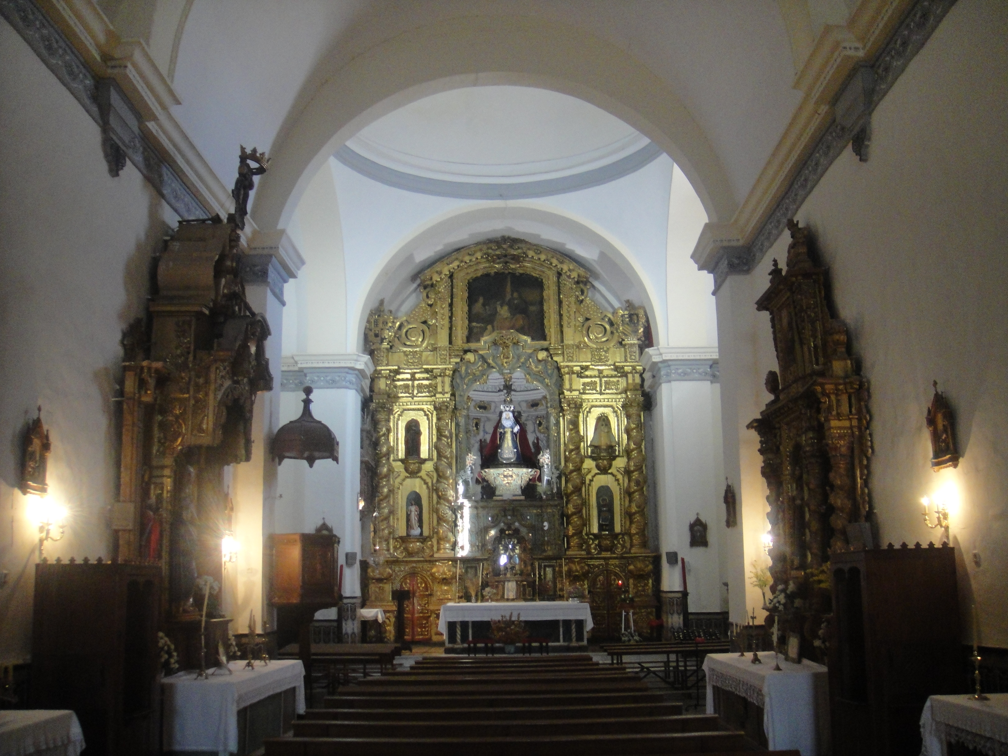 Vista general de la iglesia de San Francisco de Fuente Obejuna, provincia de Córdoba, (España).